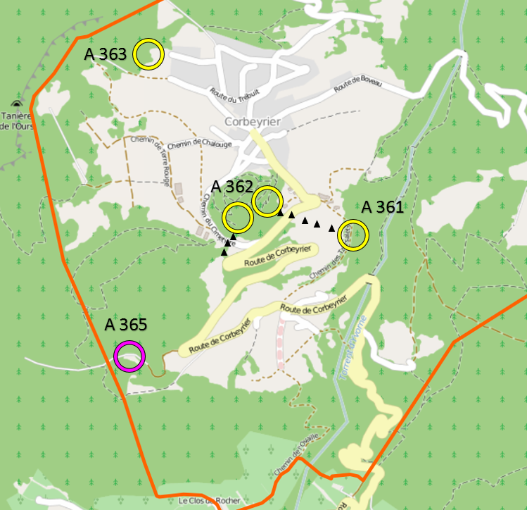 Artilleriewerk Champillon, Sperrstelle Corbeyrier VD, Schweiz